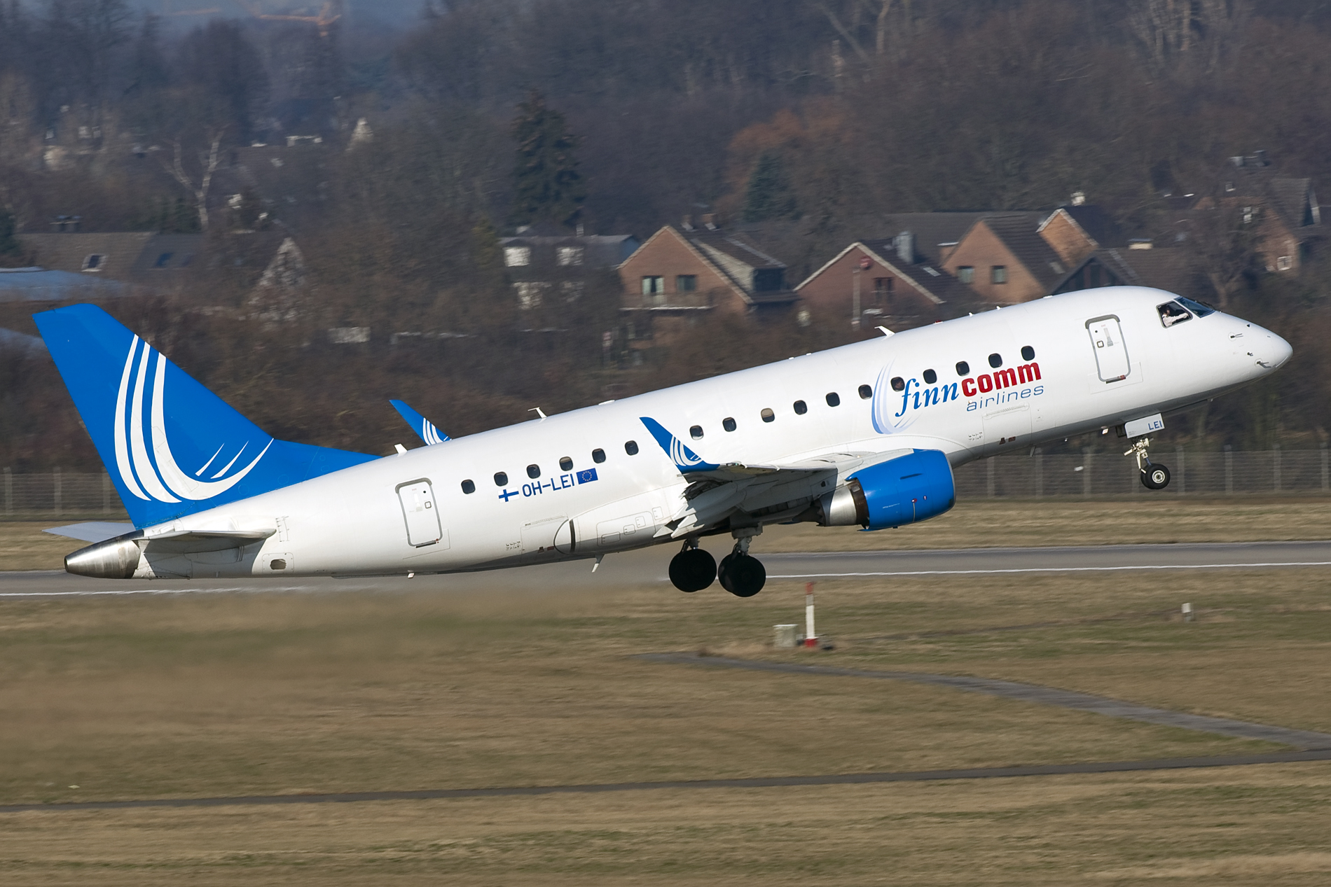 Dusseldorf